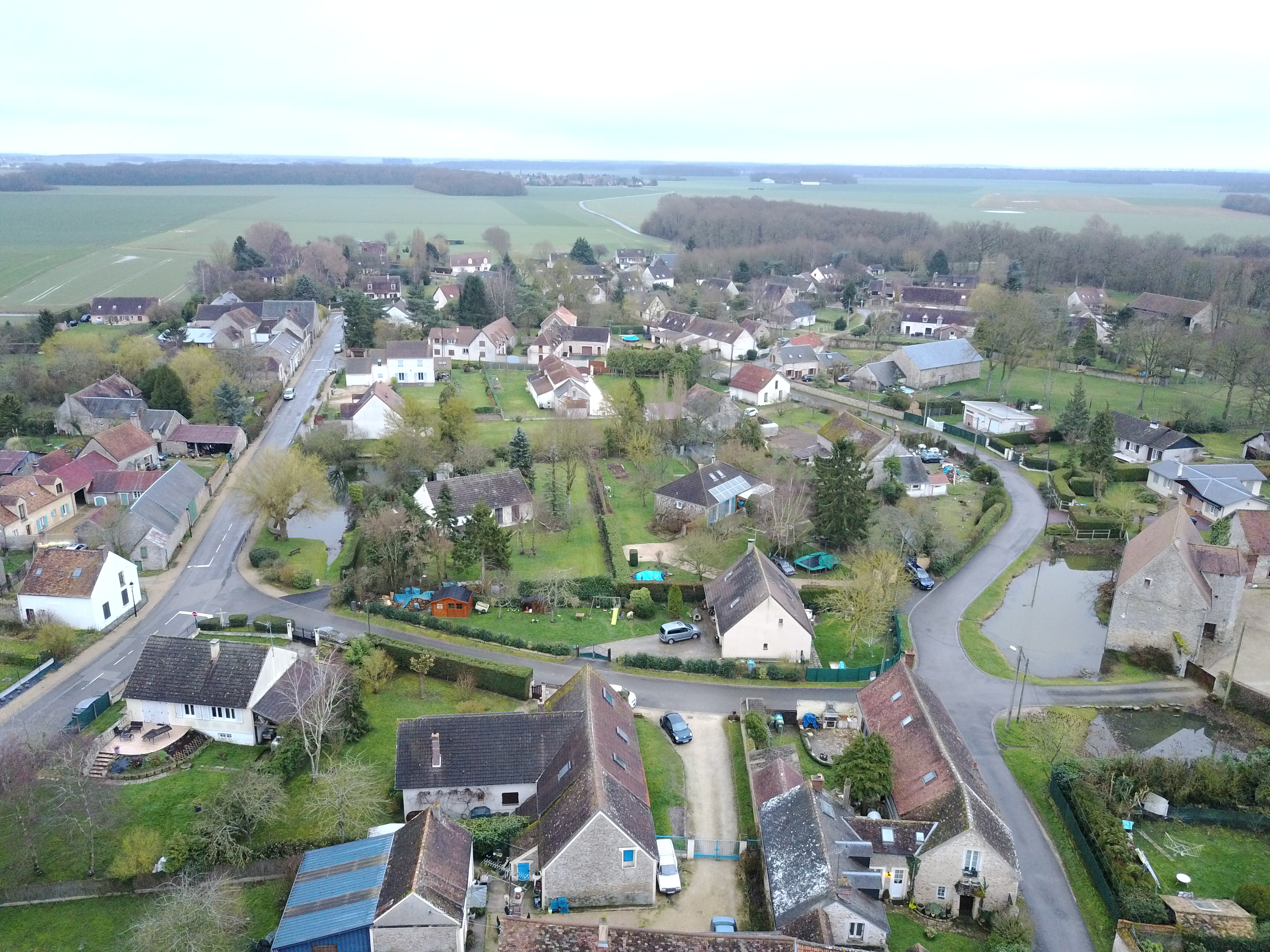 C'est jolie